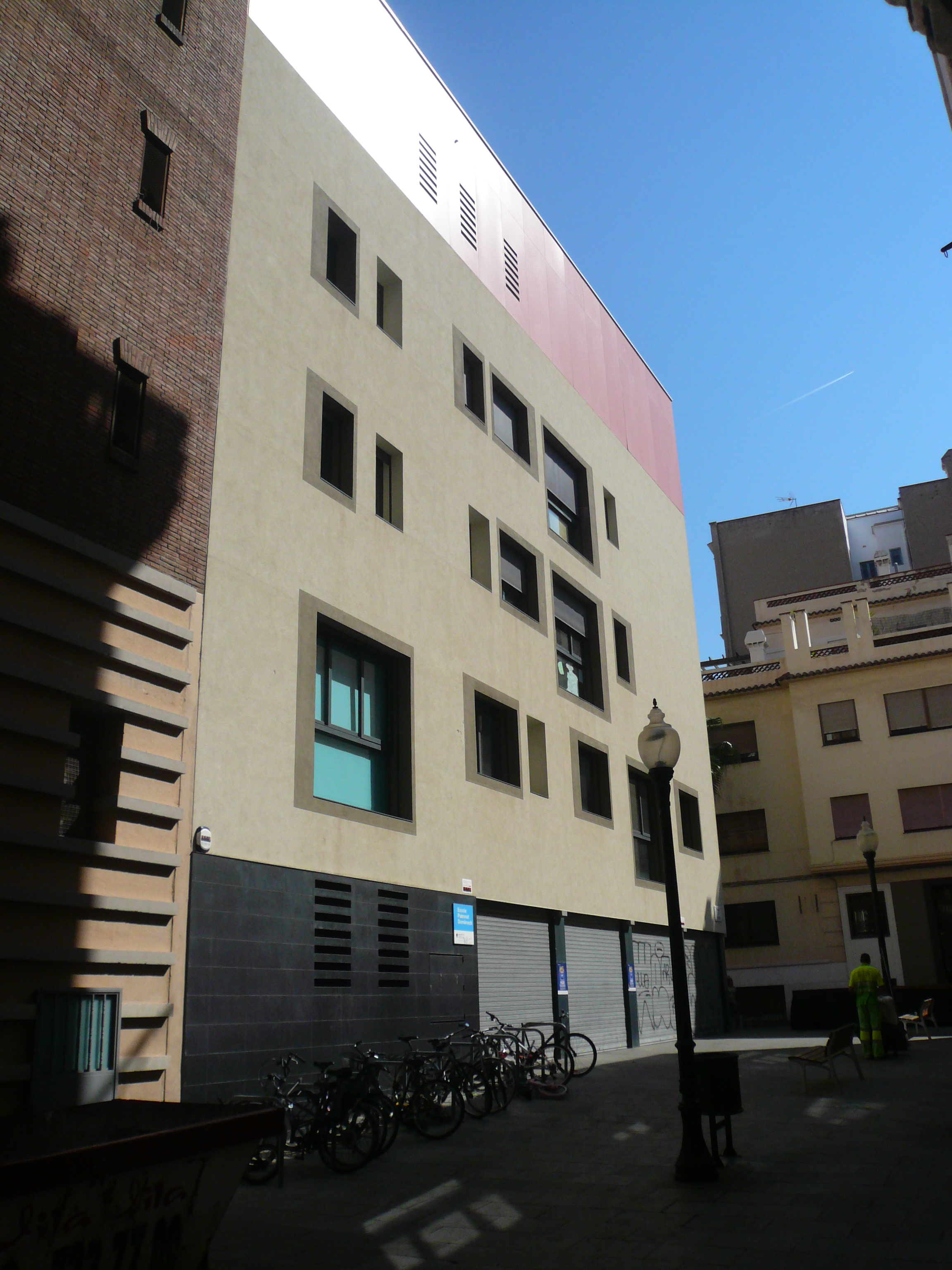 Escola Municipal Patronat Domènech